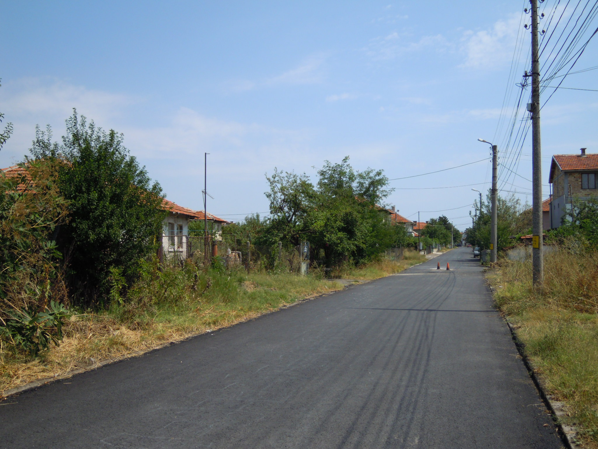 Вид улицы Эсперанто (Есперанто) в Долно-Езерово в августе 2012 года.